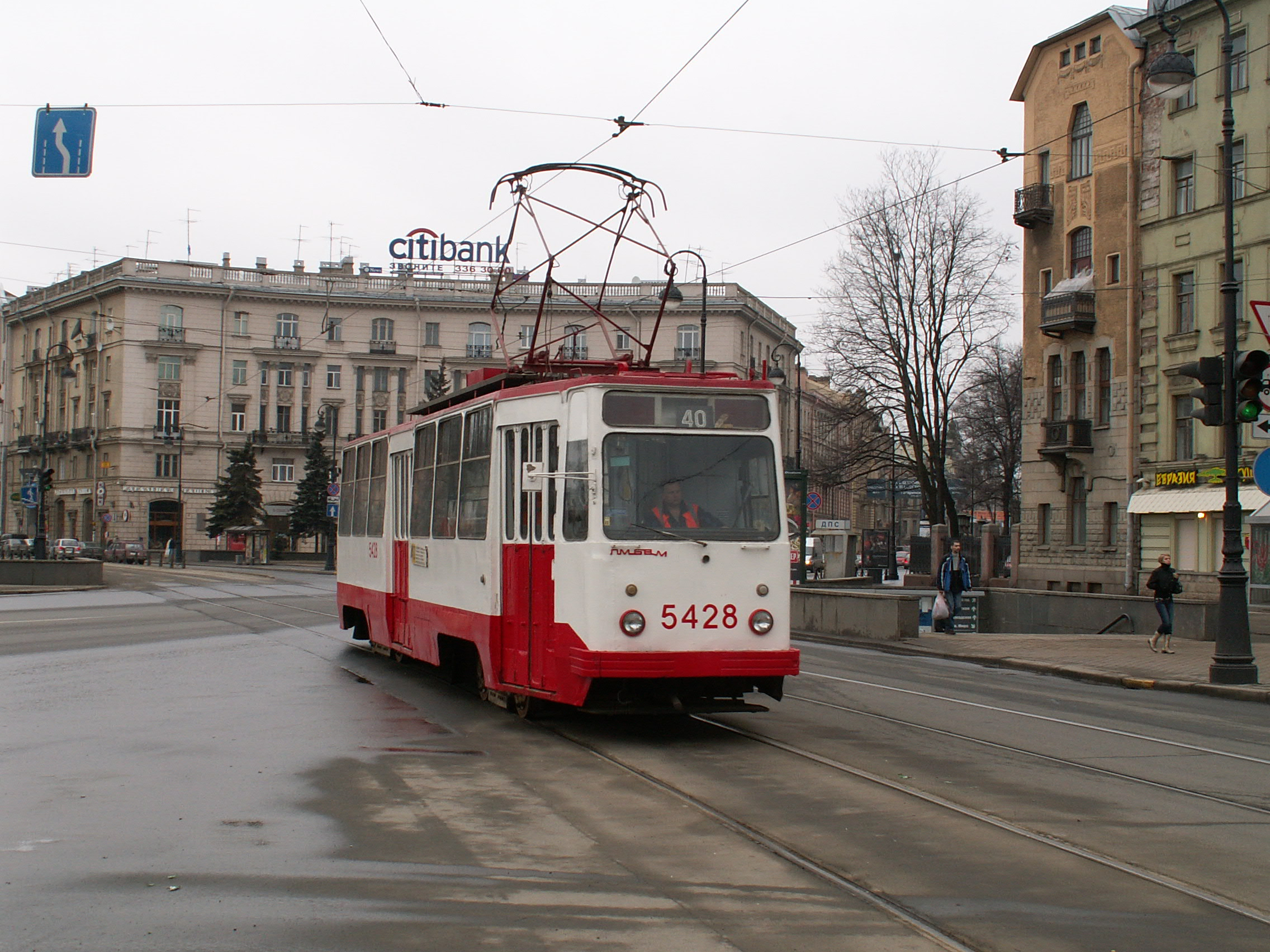 Трамвайный вагон ЛМ-68М 5428 на пересечении Каменоостровского и Кронверкского проспектов. Санкт-Петербург